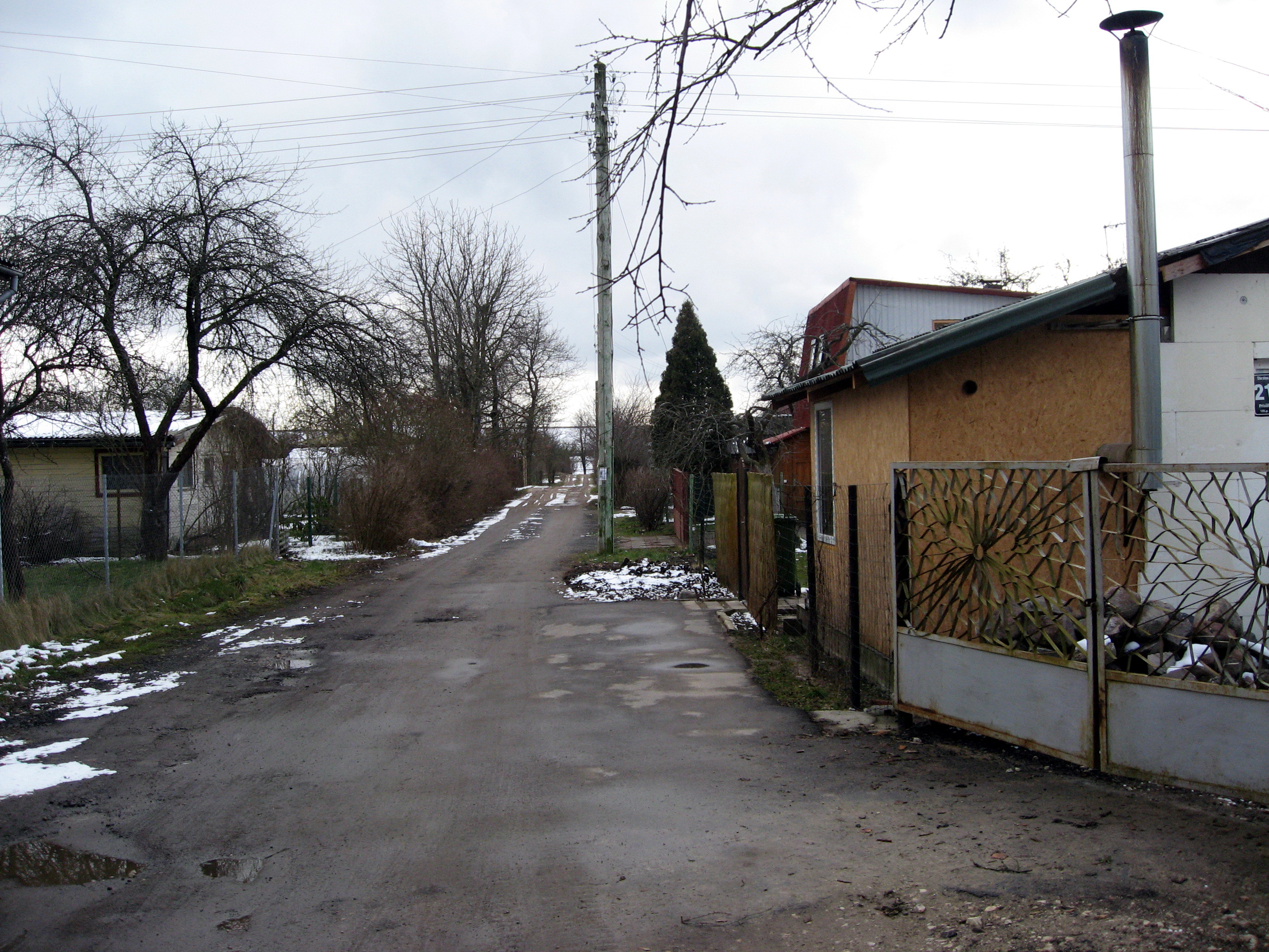 Dārziņi, 48. līnija